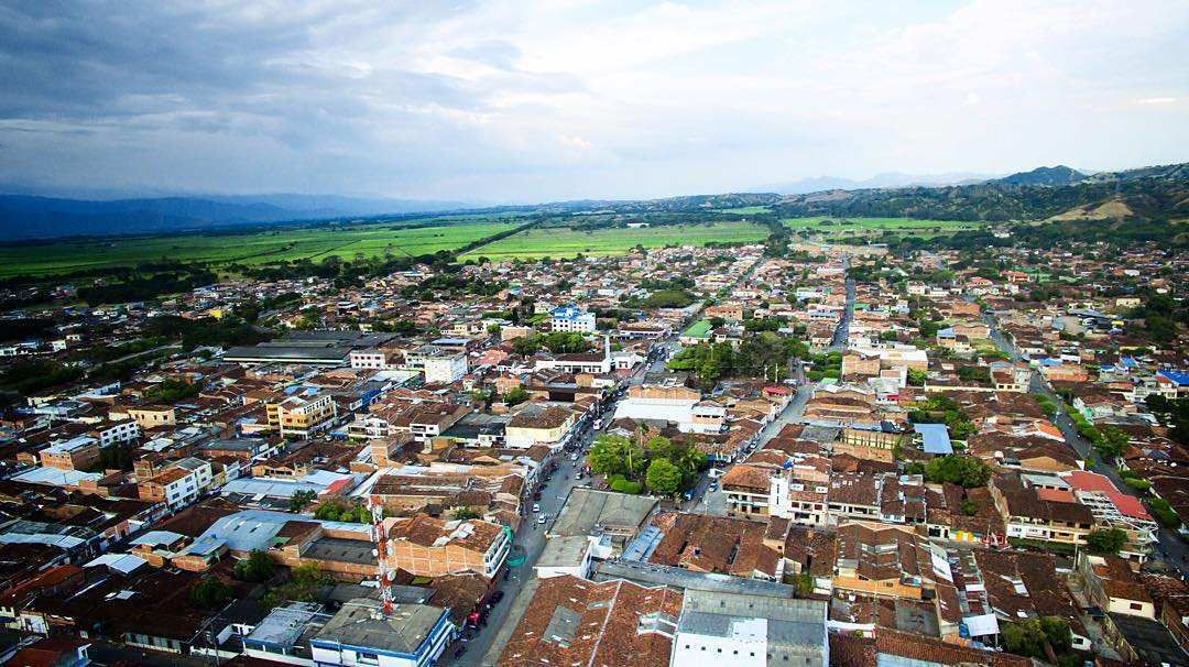 Zarzal Valle del Cauca